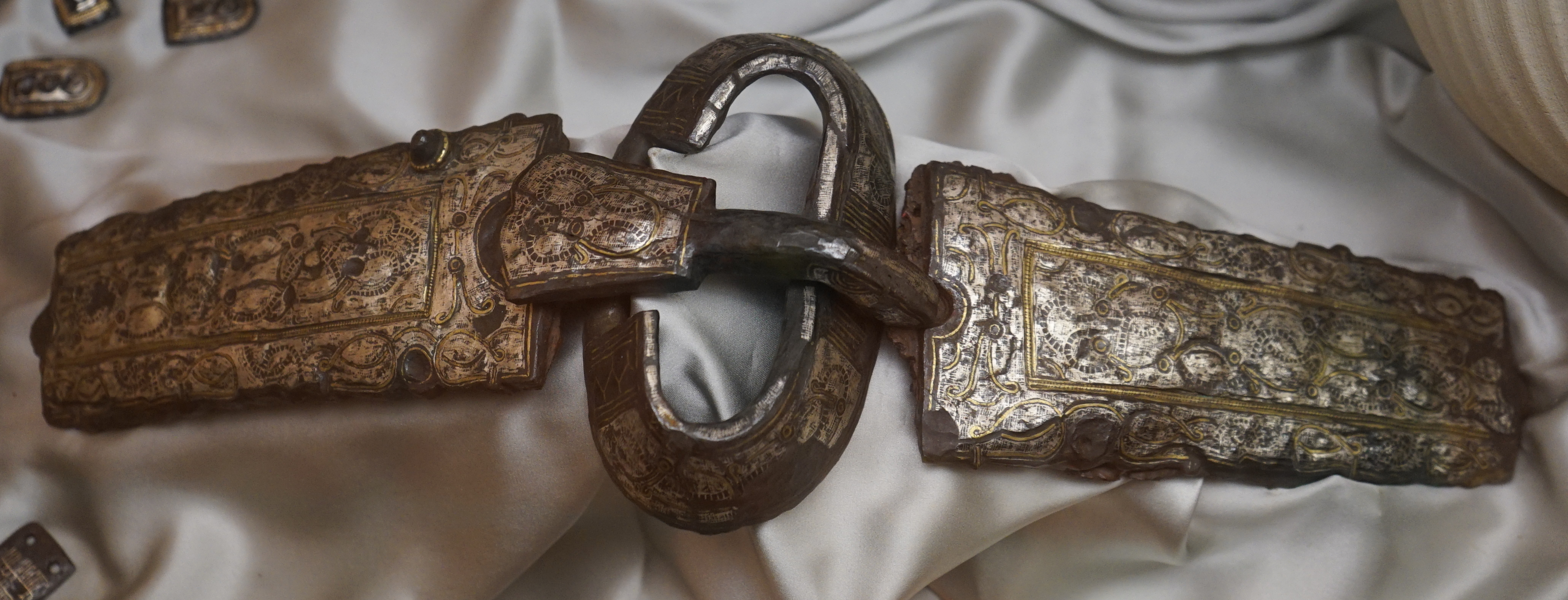 issu des fouilles de l'Isle Aumont, salle du sous soll du musée st-Loup.